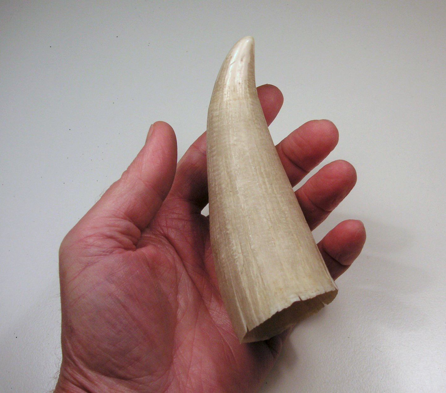 Kaskelotvalens tand, bara spetsen, ungefär från pekfingret, tittar fram. Zahn eines Pottwals, nur die Spitze des Zahns, ungefähr vom Zeigefinger aus, schaut heraus.